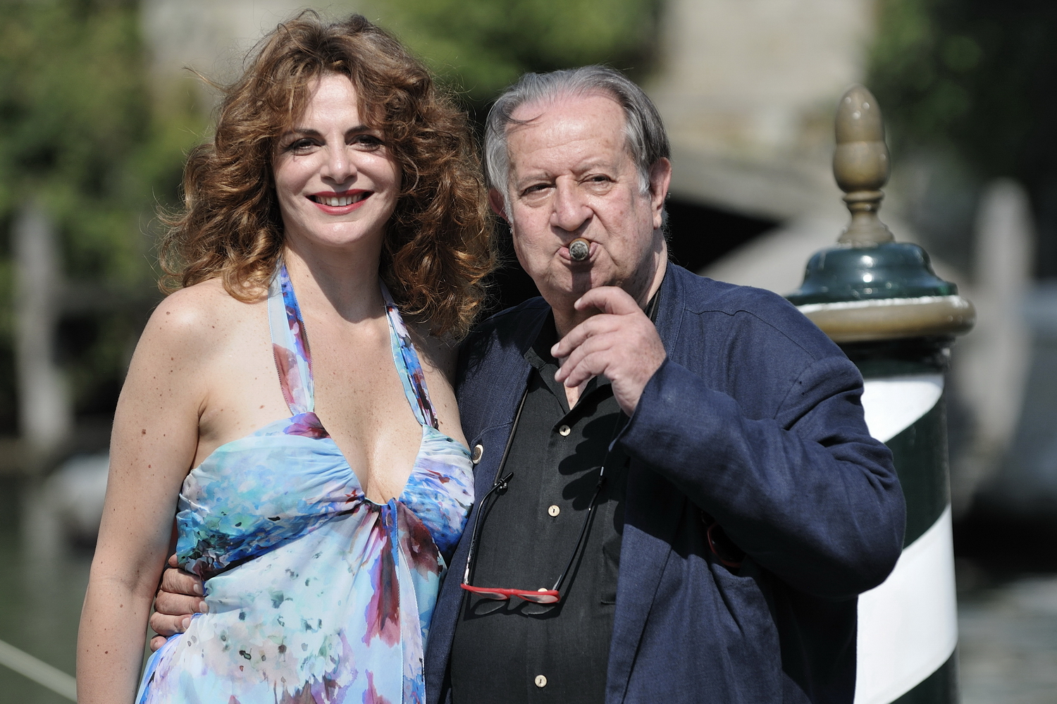 66ème Festival du Cinéma de Venise (Mostra), 9ème jour (10/09/2009): Tinto Bras & Caterina Varzi